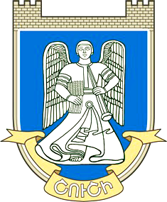 Ռուբեն Արուտչյանի գործերից